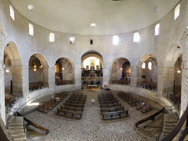 Brescia (Italy) - Duomo Vecchio Visuale a 180° dell'interno della chiesa.